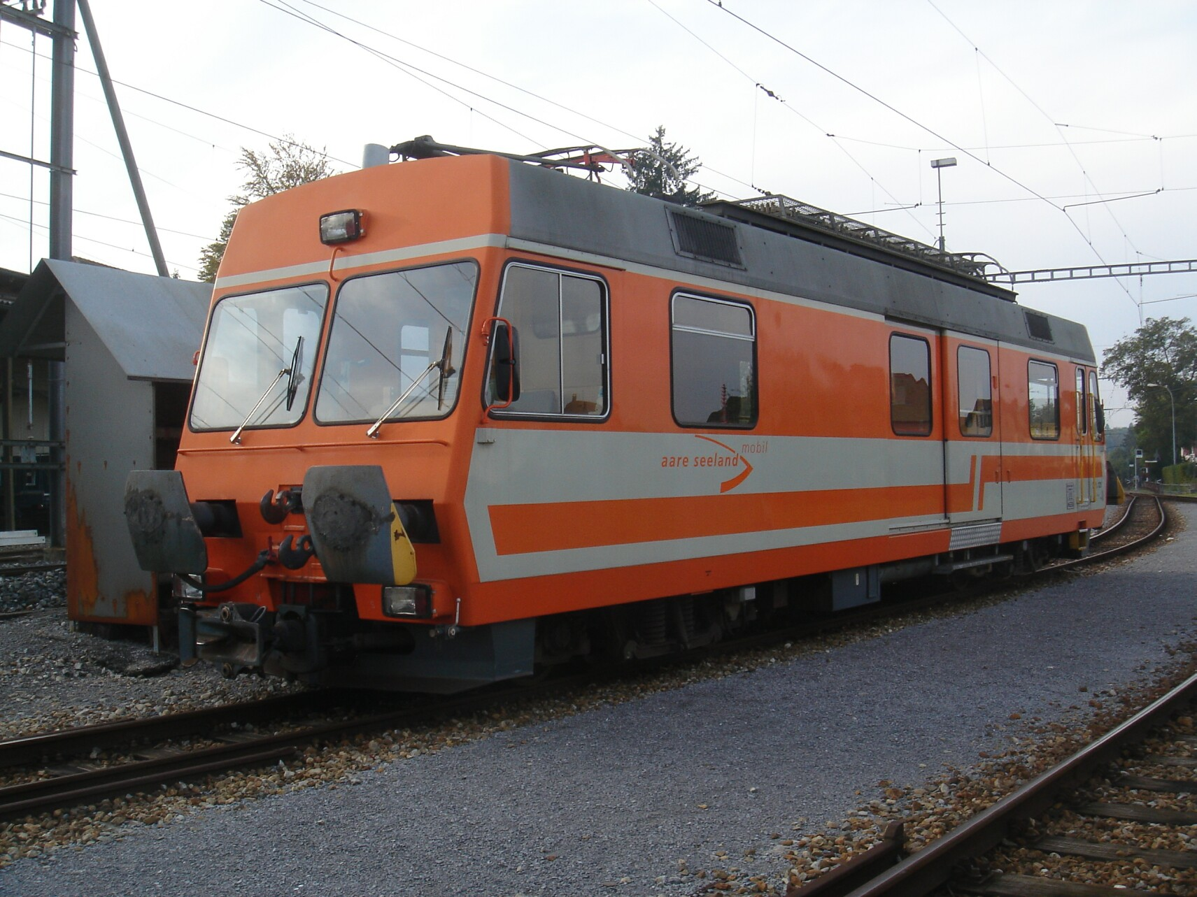 Der 1987 von Stadler, BBC und SIG gelieferte Gepäcktriebwagen De 4/4 121 der ASm zwischen zwei Einsätzen im Güterzugsdienst abgestellt bei der Rollbockgrube in Langenthal. Der Triebwagen hat asymmetrische Regelspurpuffer und zwei Zughaken. Der obere in Fahrzeugmitte wird für aufgebockte Regelspurwagen benötigt, der untere, asymmetrisch eingebaute für den Rangierdienst auf Dreischienengleisen.